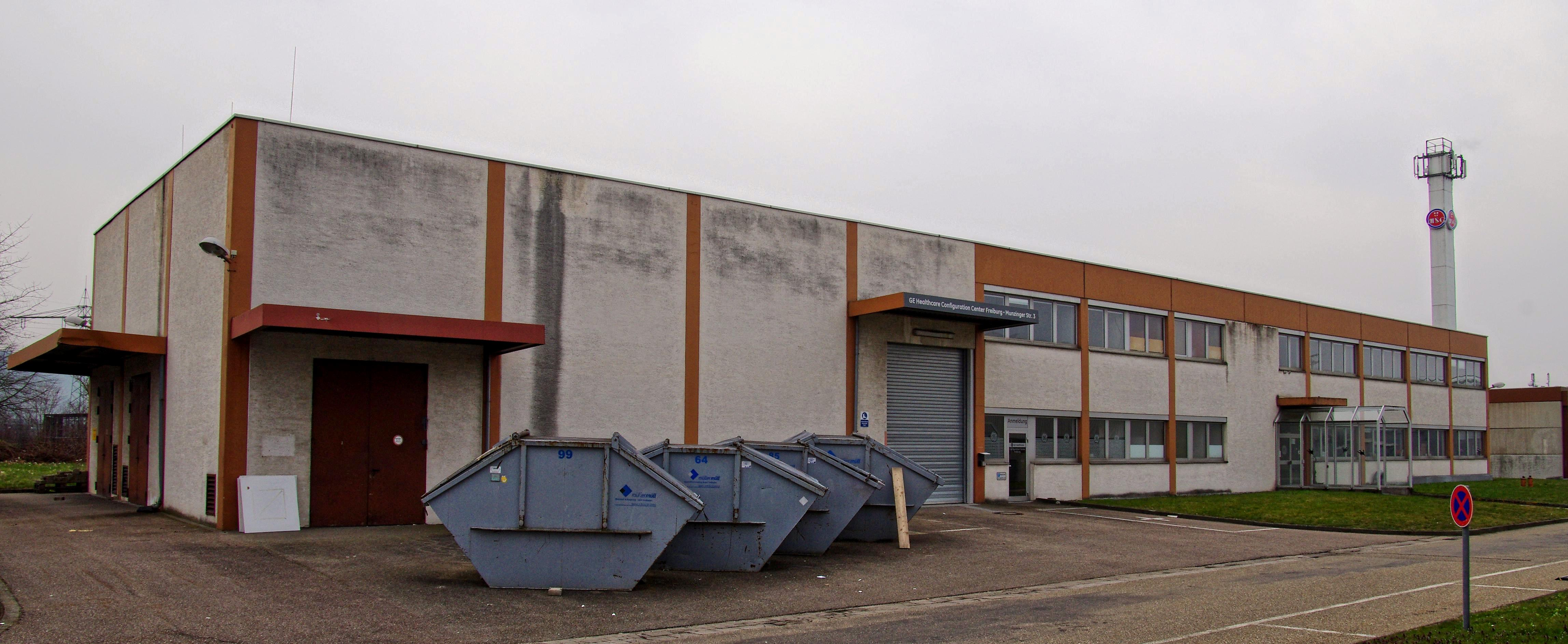 Hellige, jetzt General Electric